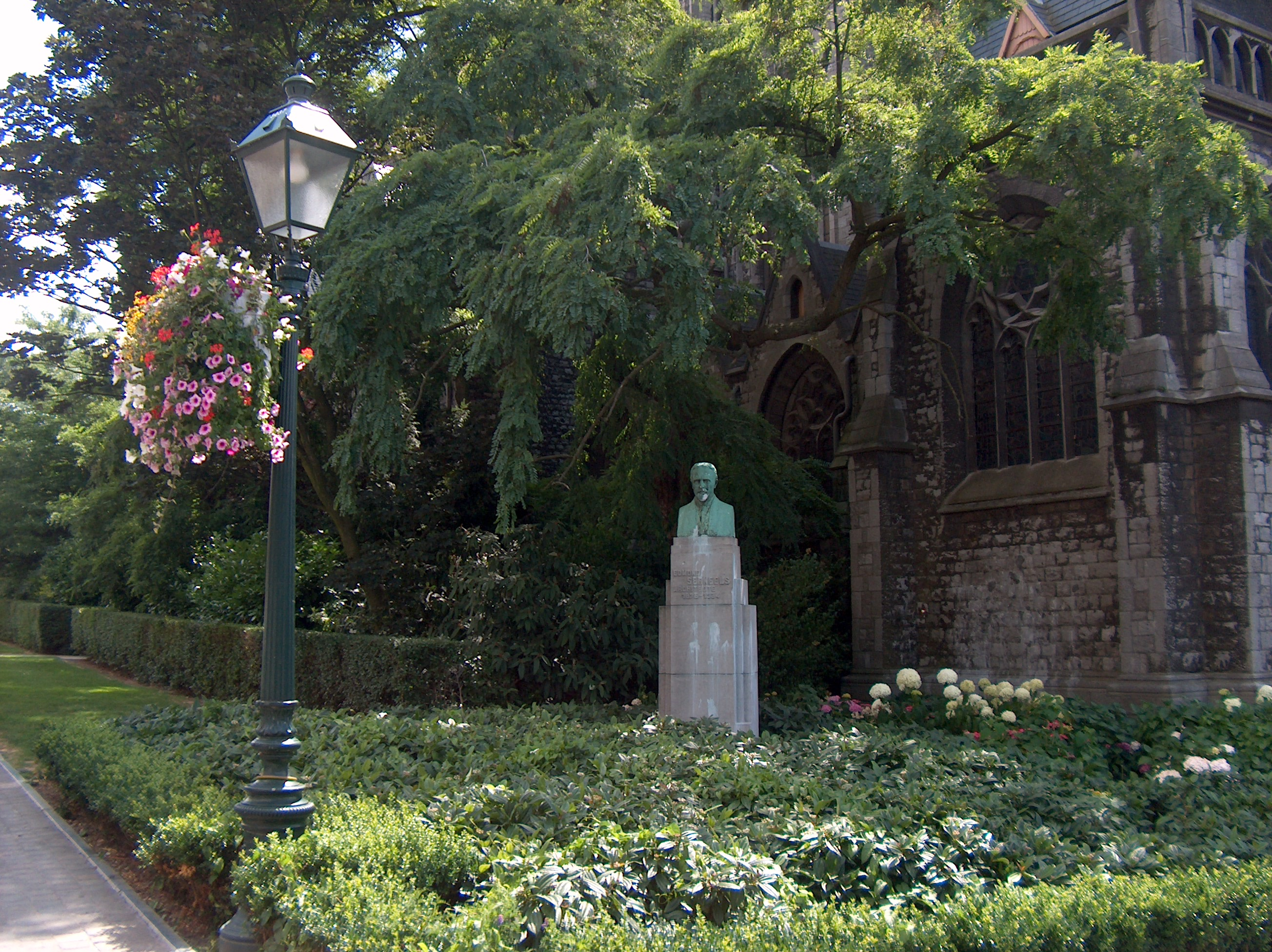 Buste d'Edmond_Serneels par Edmond de Valériola à Etterbeek, Bruxelles, Belgique.